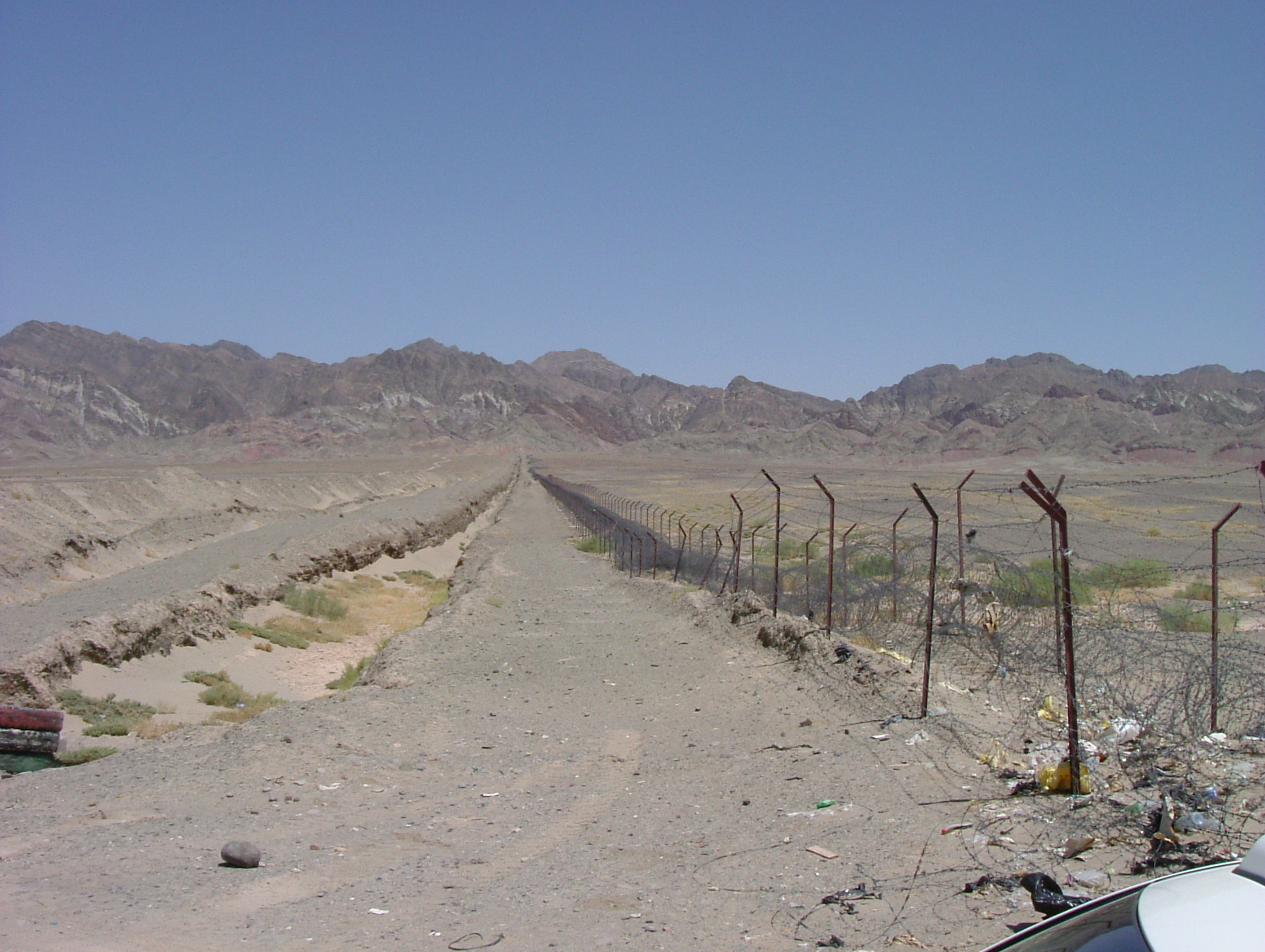 Iran - Pakistan border